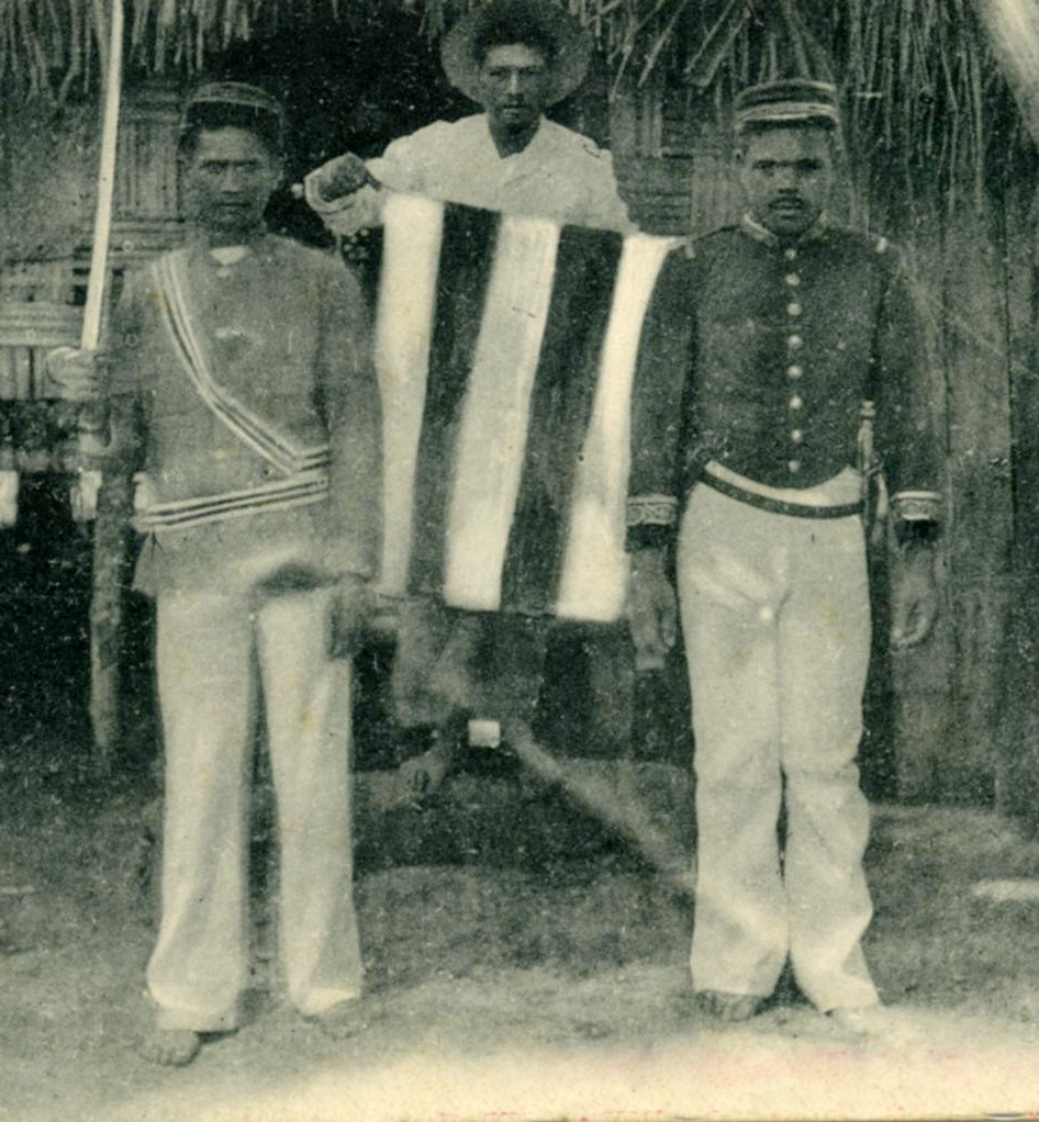 Raiatea (Iles Sous le Vent de Tahiti) – Avant la pacification. – Officiers indigènes, à Avera.